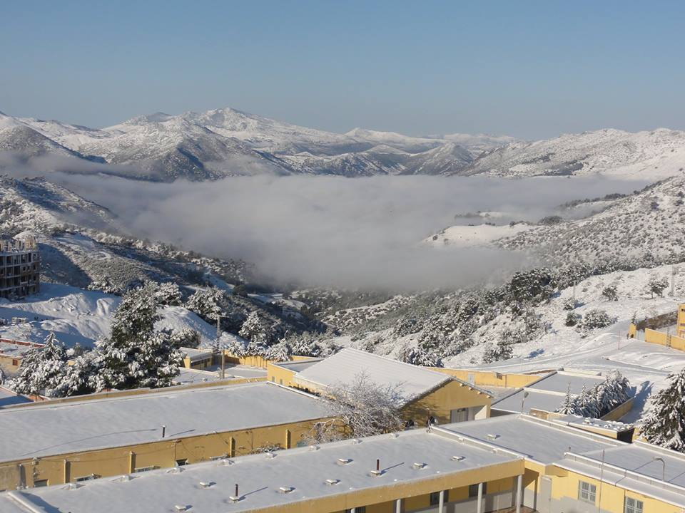 Une vue de la ville Lazharia, située à 1000m d'altitude au pied du mont Ouarsenis elle surplombant la vallée du fleuve Chélif